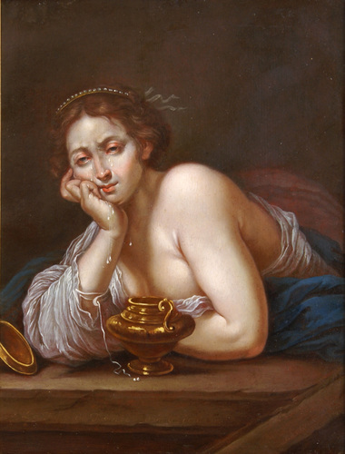 La Fille de Tancréde. dans sa douleur